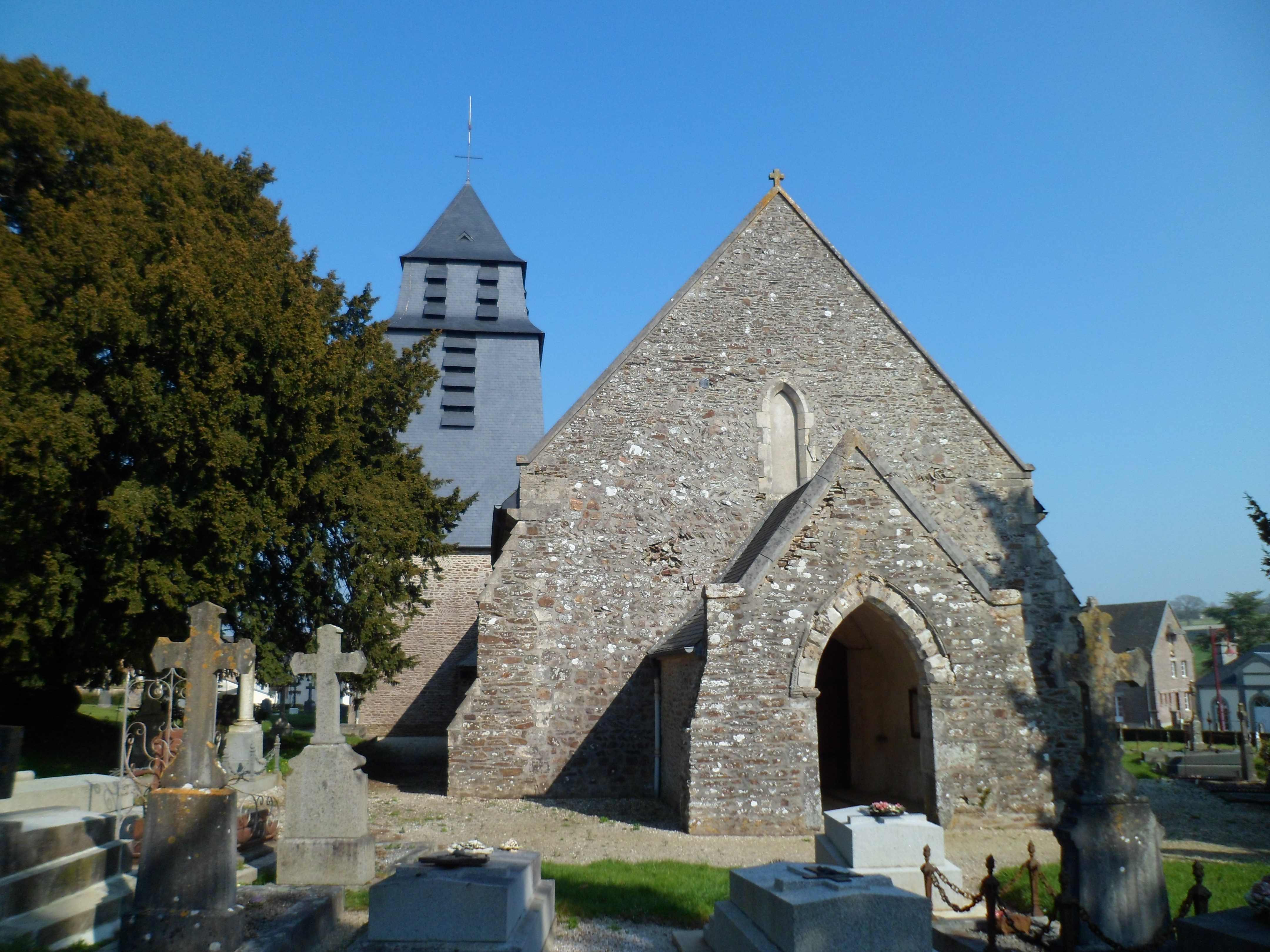 Église Saint-Rémy de Quibou